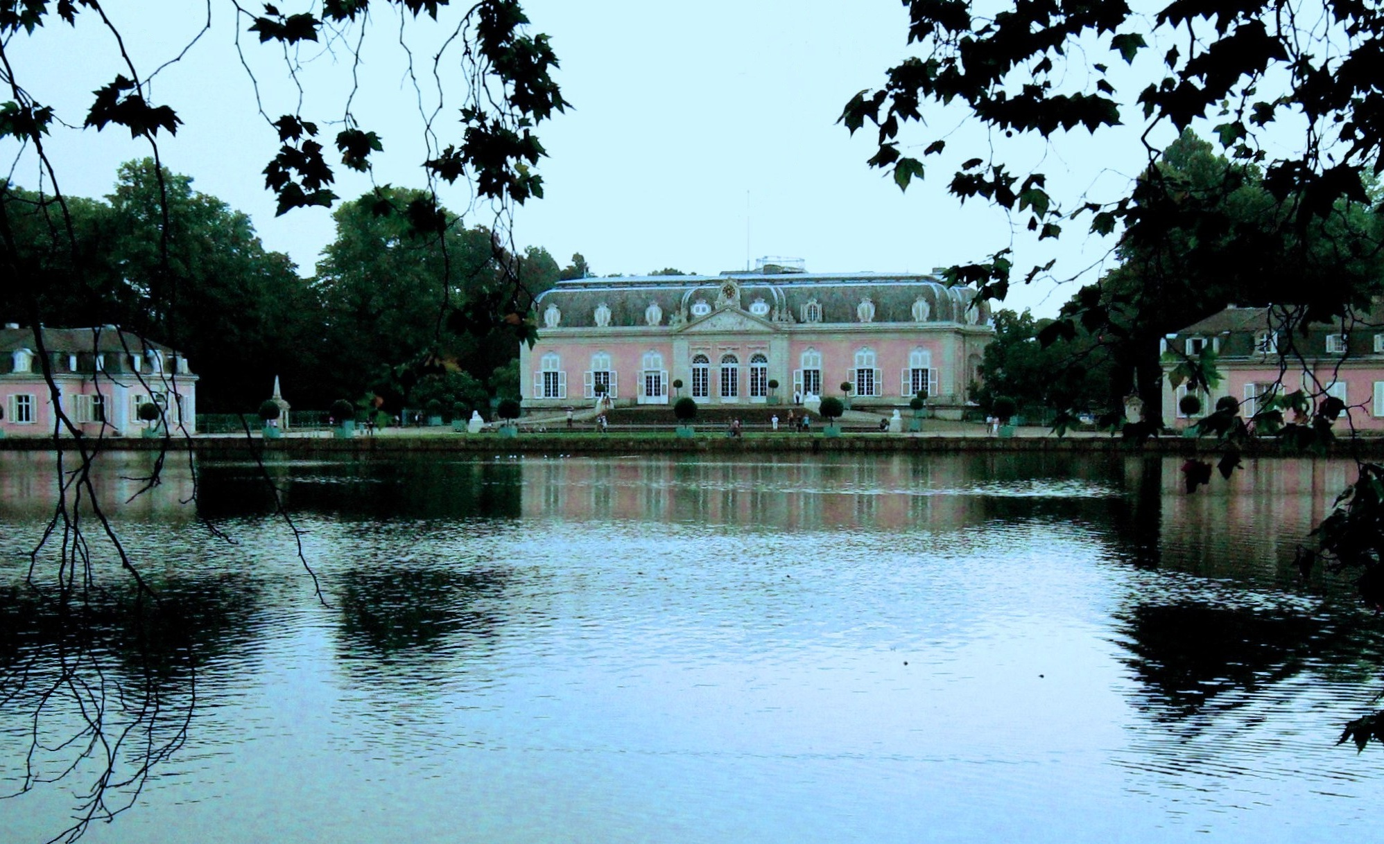 Schloss Benrath 2009 (Gesamtansicht von Norden)